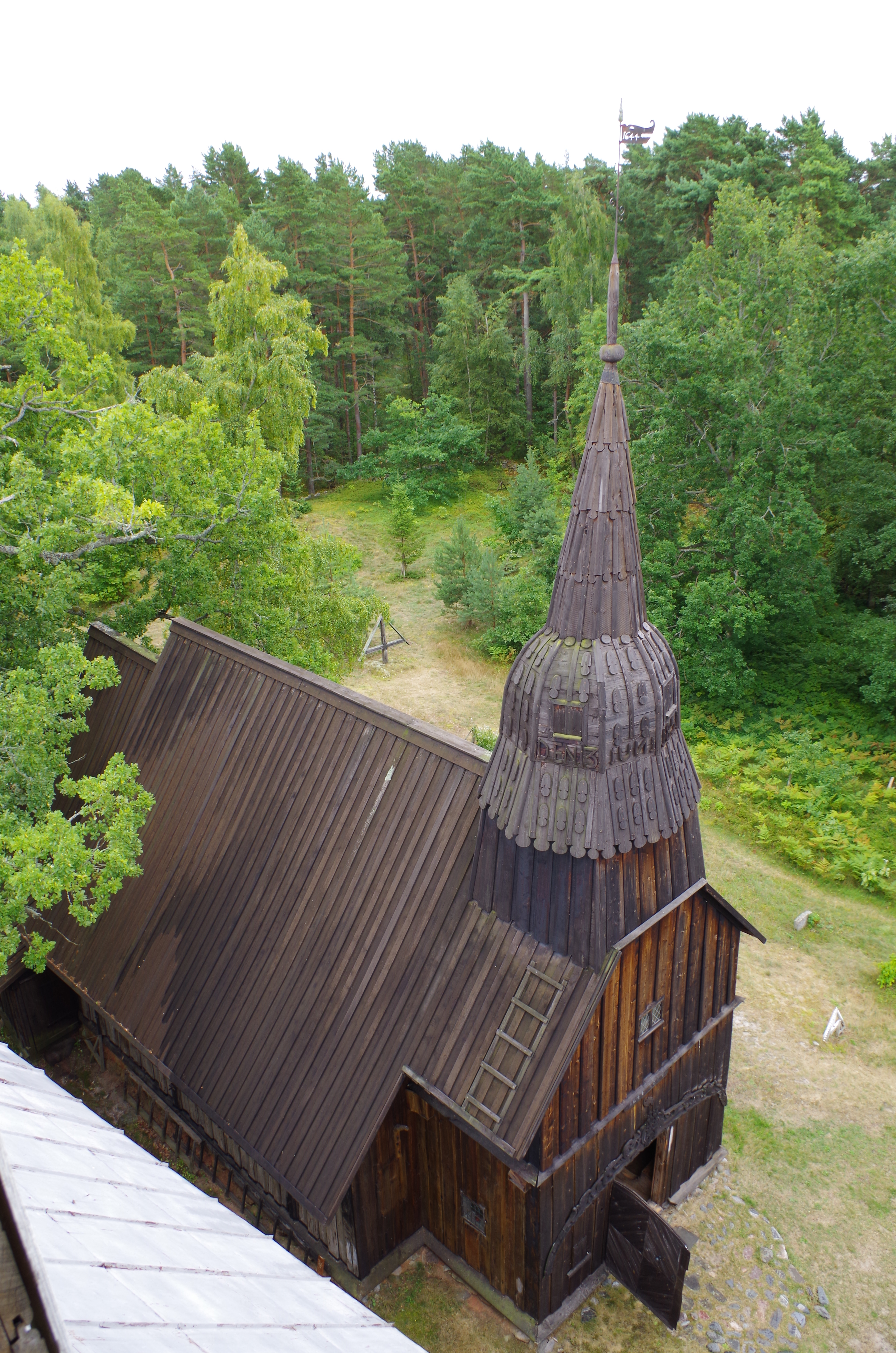 Ruhnu vana kirik